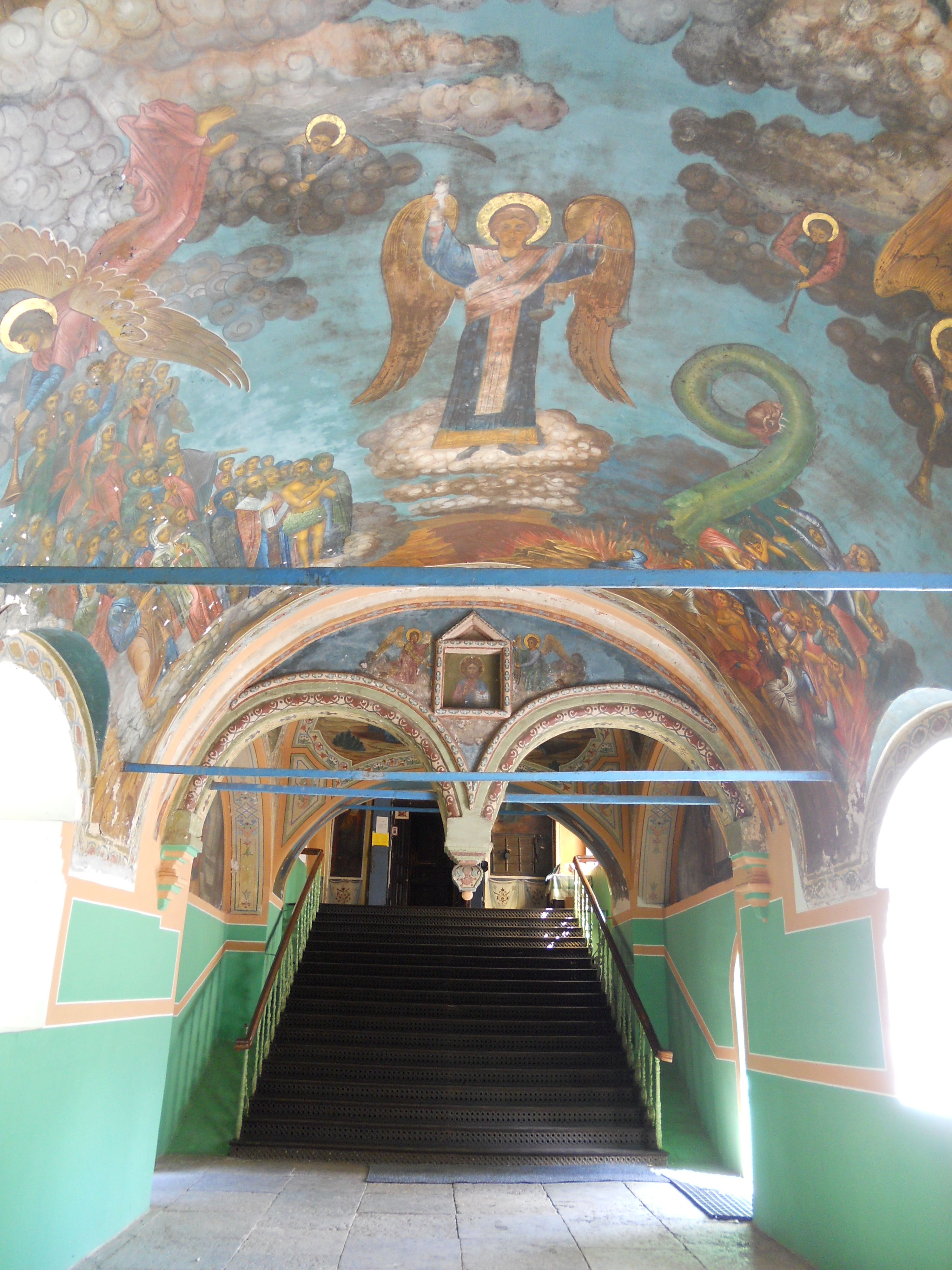 Церковь Воскресения на Дебре (Знаменский Храм) в Костроме